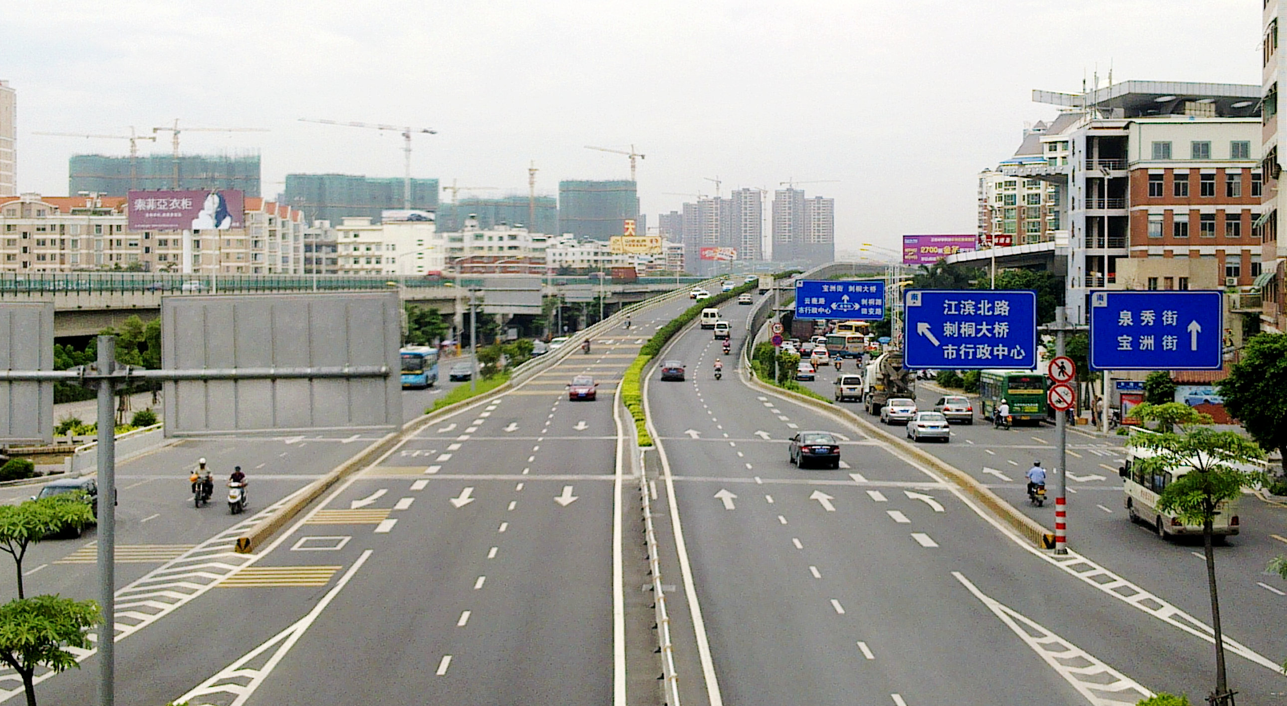 坪山路（妙云天桥往坪山高架桥视角）